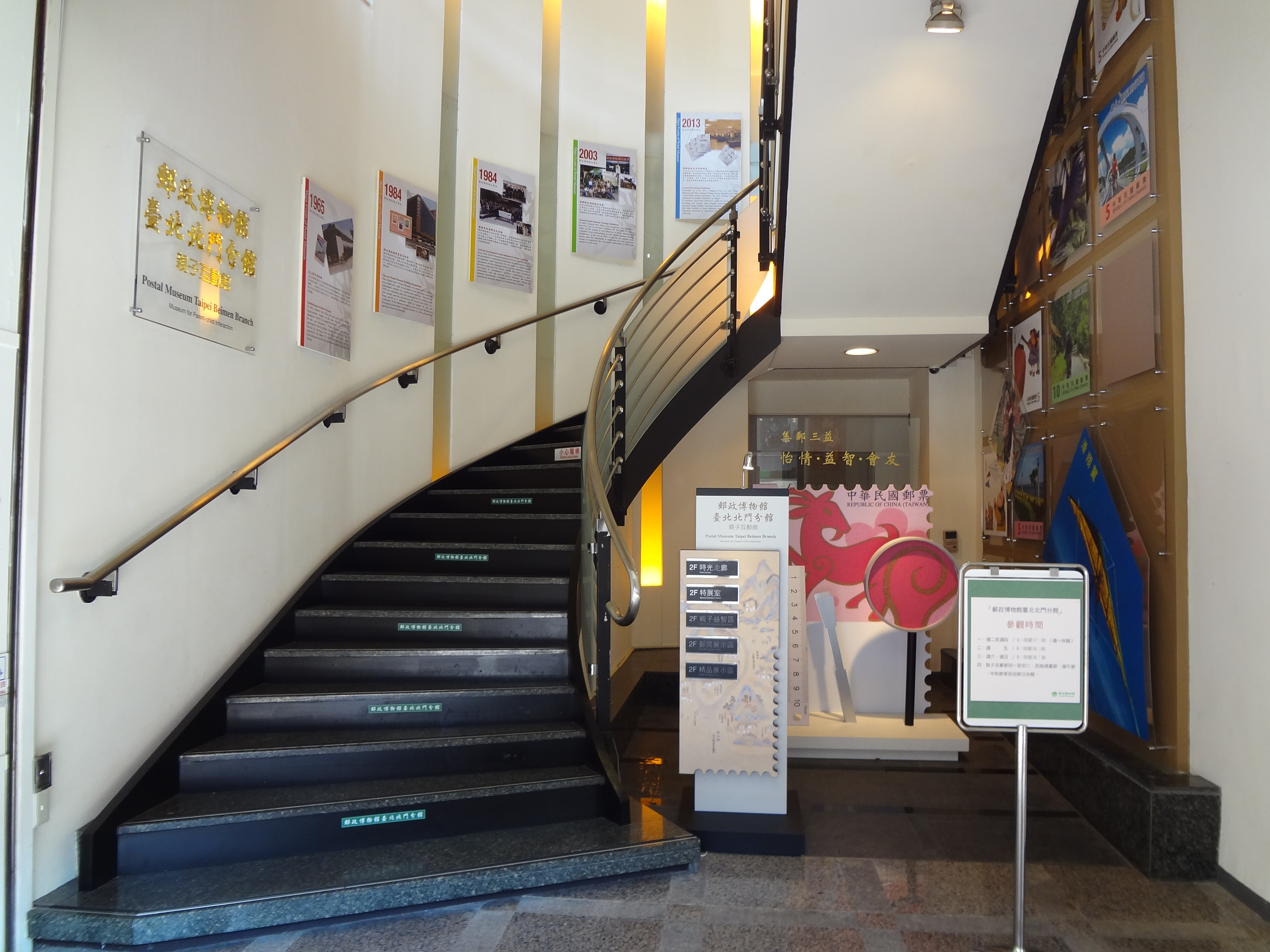 郵政博物館臺北北門分館，位於臺北郵局2樓。